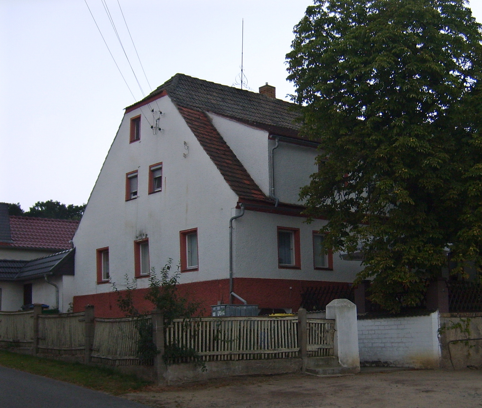 Gröden -Schlegels Gaststätte.